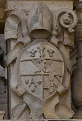 Stemma dell'Abate Celso Amerighi, particolare all'Altare della Croce, nella Basilica della Santa Croce di Lecce. Blasonatura: Partito: nel primo d'azzurro, alla lettera A maiuscola d'oro, accompagnata da tre stelle di otto punte dello stesso, disposte 2.1 (Amerighi); nel secondo partito: nel primo d’argento alla croce d’azzurro nascente dalla partitura, caricata da quattro montanti d'oro (Piccolomini); nel secondo, d'azzurro alla banda d'argento caricata di due teste d'aquila di nero, affrontate e ingollanti una sfera d'oro (Bandini). Col capo dell'Impero; il tutto abbassato sotto il capo della congregazione dei Celestini. In alternativa: Partito: nel primo d'azzurro, alla lettera A maiuscola d'oro, accompagnata da tre stelle di otto punte dello stesso, disposte 2.1 (Amerighi); nel secondo partito: nel primo d’argento alla croce d’azzurro nascente dalla partitura, caricata da quattro montanti d'oro (Piccolomini); nel secondo, (talvolta) d’argento alle tre bande di rosso (Bandini). Col capo dell'Impero; il tutto abbassato sotto il capo della congregazione dei Celestini.